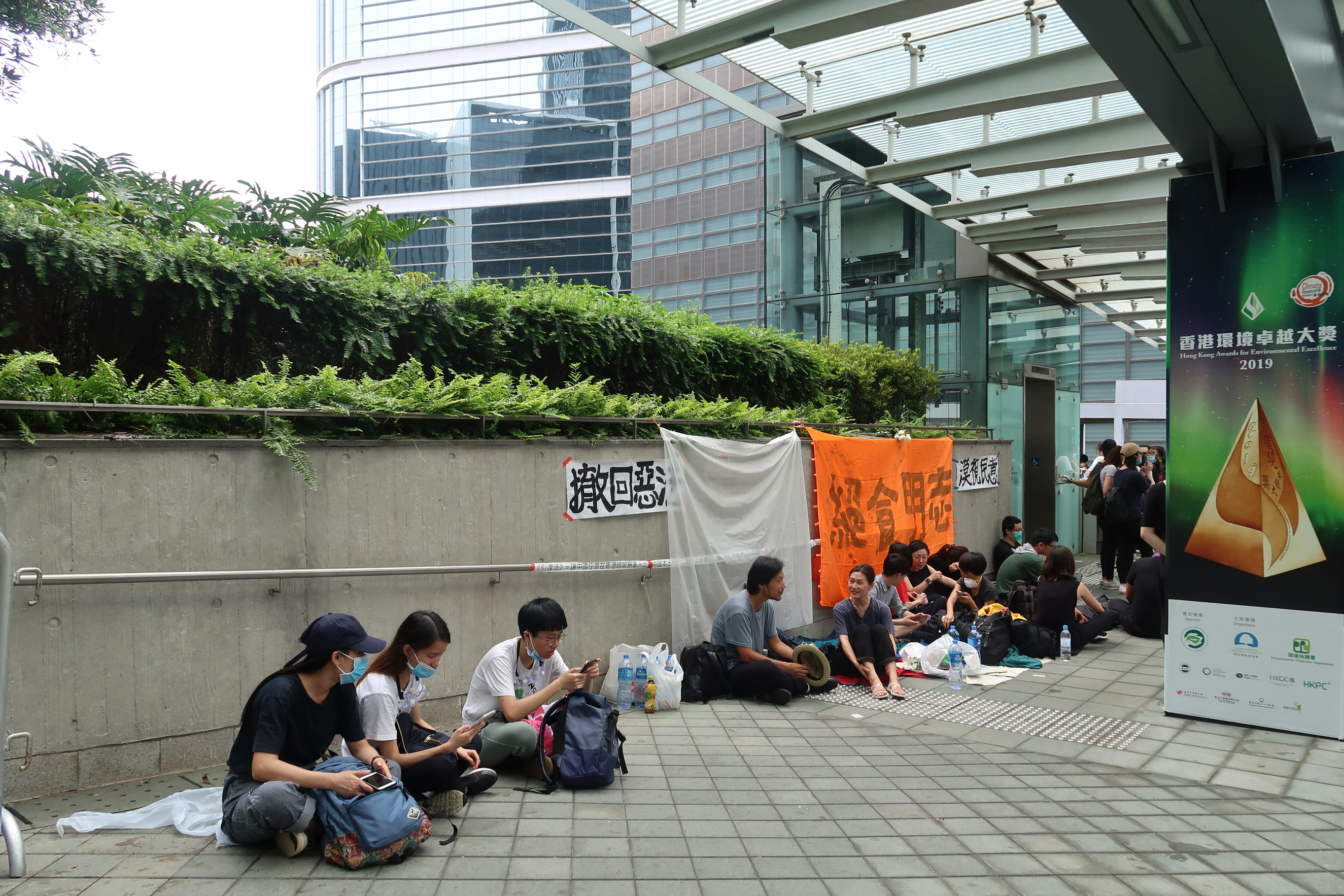 大專教育界及文藝界發起絕食抗議修例